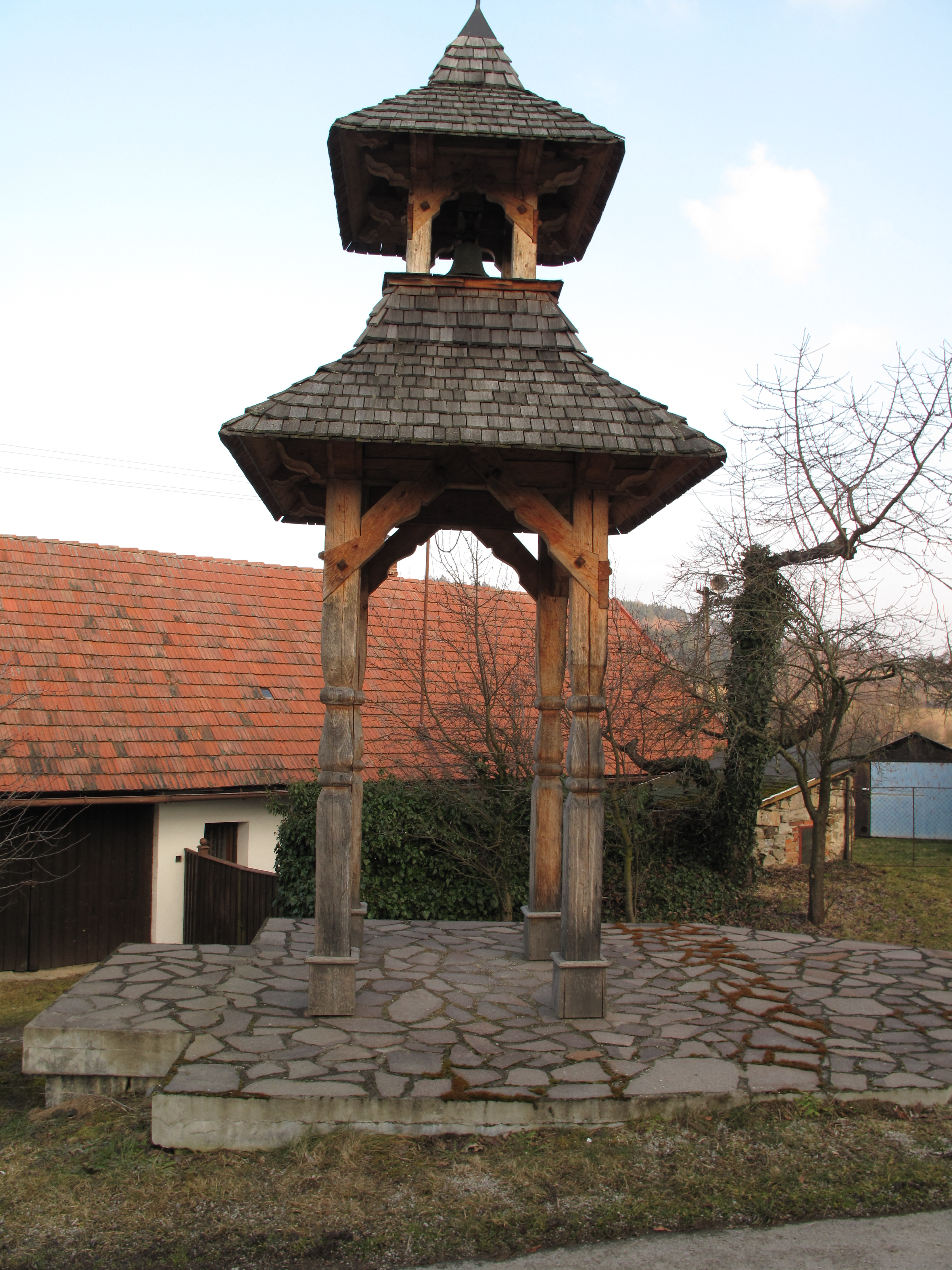 Zvonička v Bolíkovicích. Okres Prachatice, Česká republika.